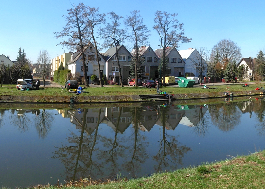 Teren nad Kanałem Bydgoskim na osiedlu Miedzyń w Bydgoszczy